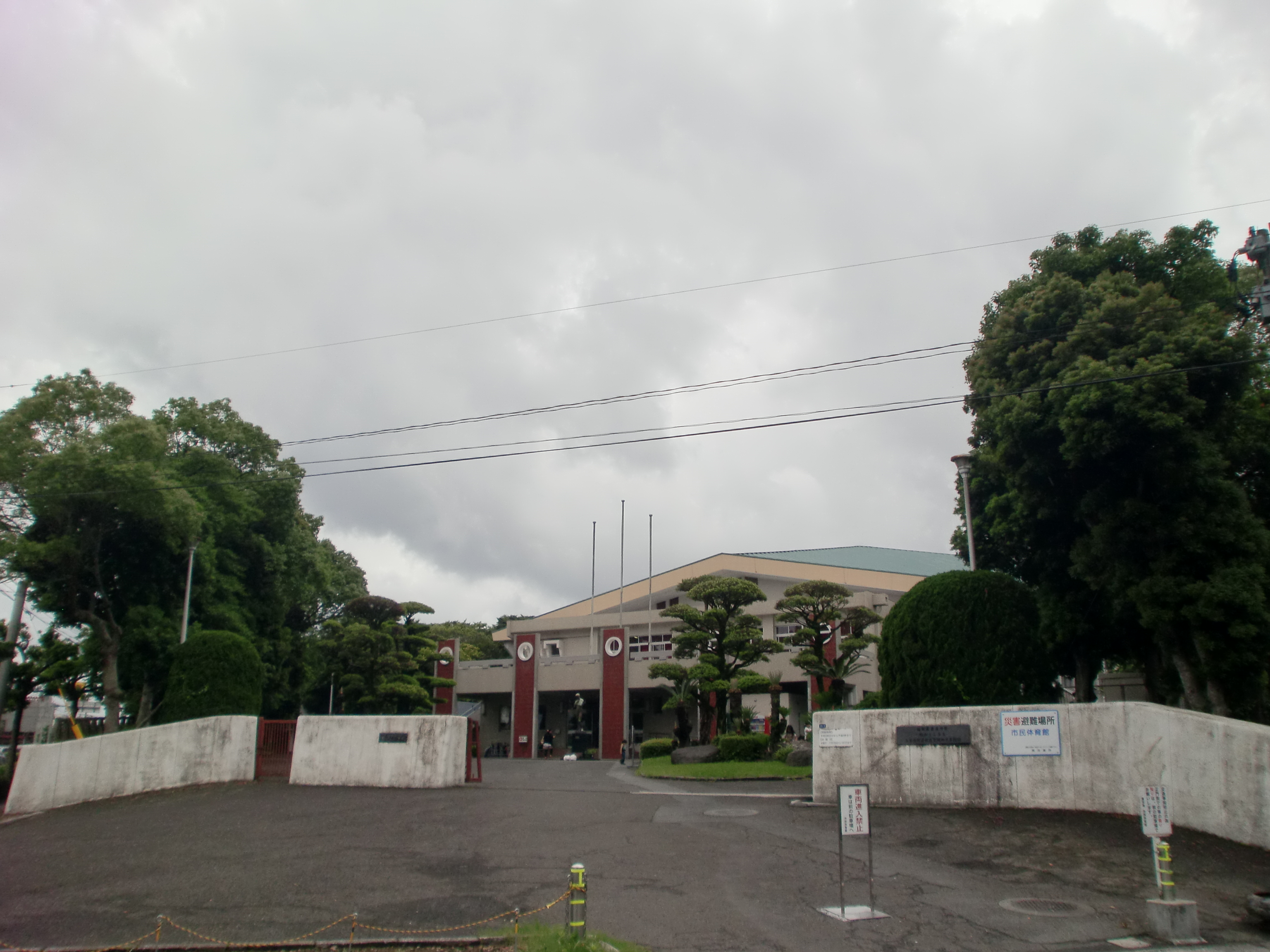 鹿児島市民体育館の外観。